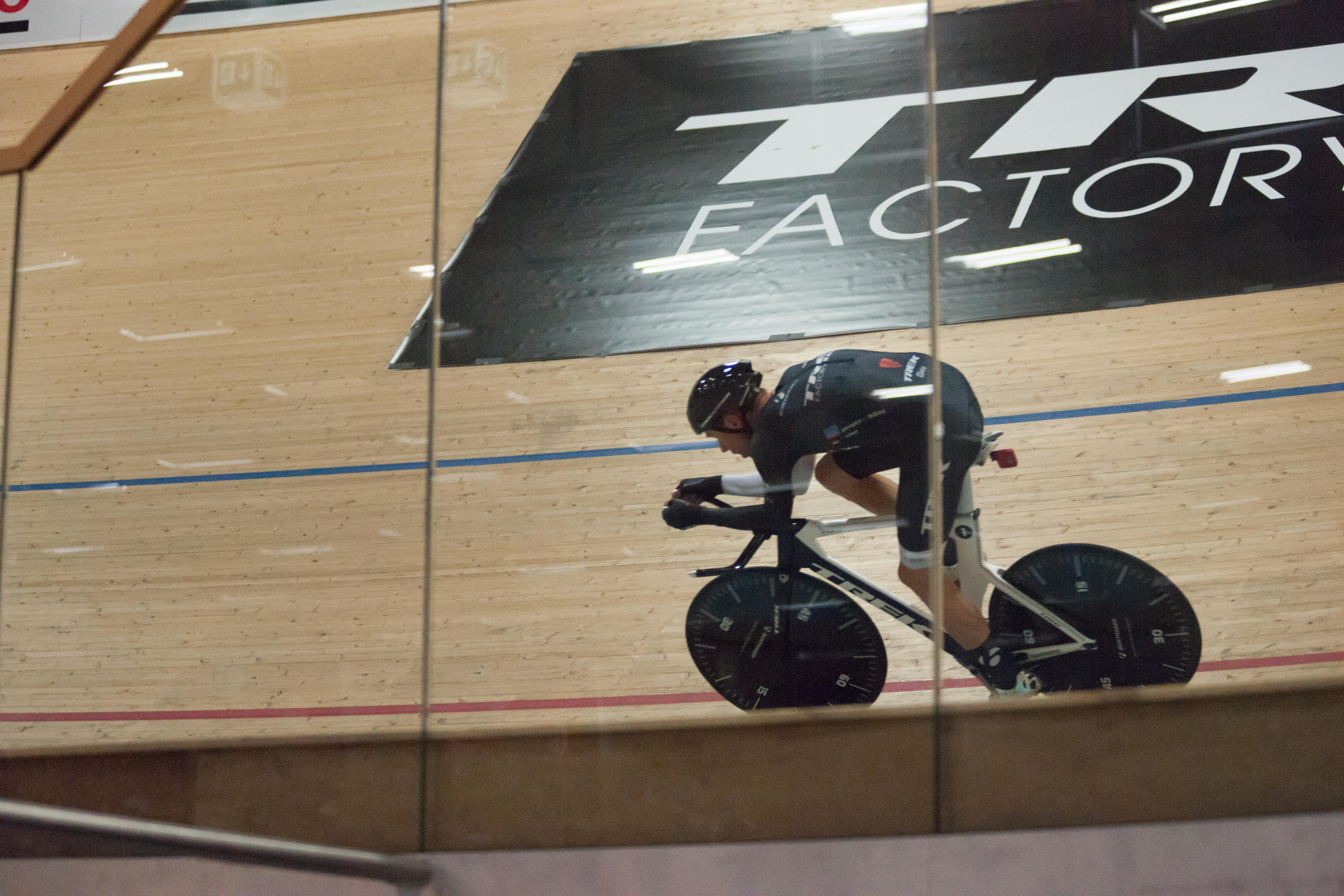 Jens Voigt - Hour Record - Race